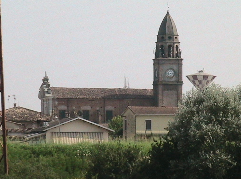 Polesine Parmense - Antica Corte Pallavicina - Castello